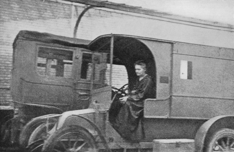 Marie Curie - Mobile Military Hospital X-Ray-Unit